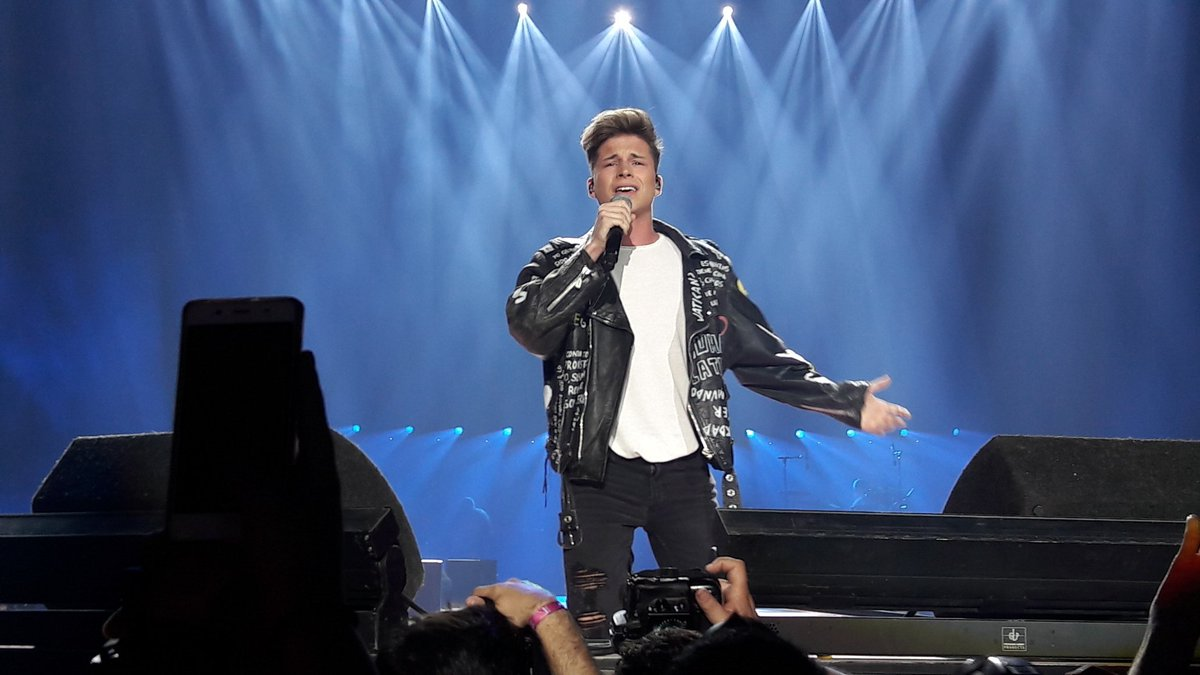 Raoul Vázquez canta en el Wizink Center de Madrid, CCME Fan edition, evento de Coca Cola donde canto Estare Ahí, Perfect y Million Reasons. parte 2